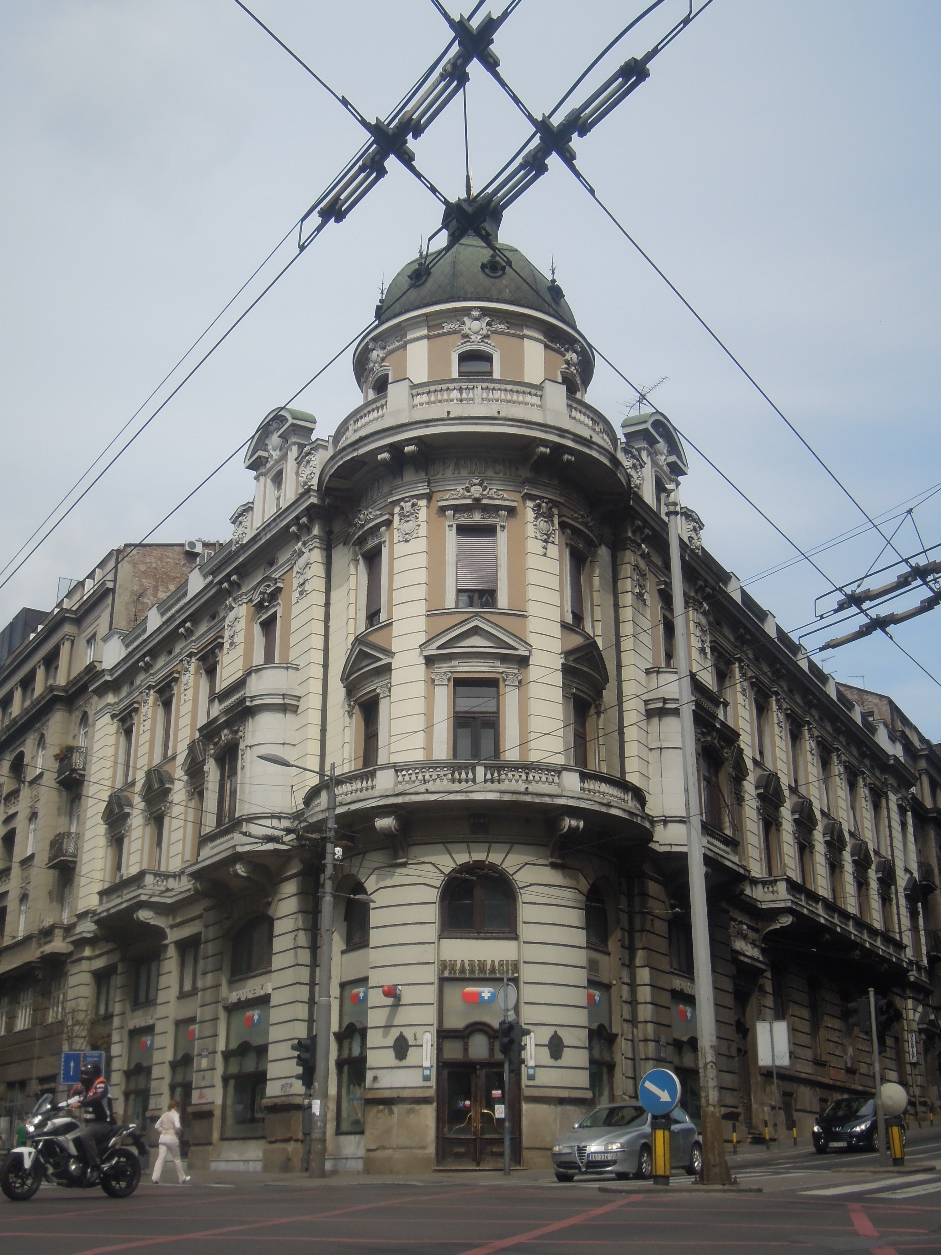 Dom vračarske štedionice.